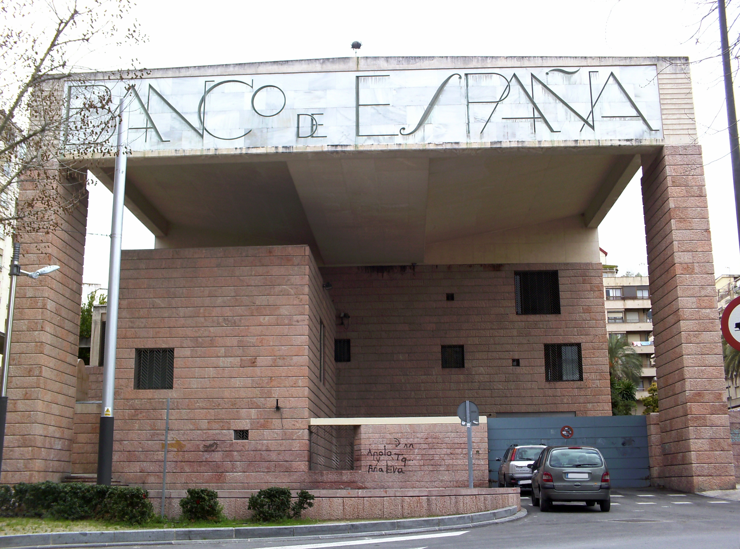 Antiguo edificio del Banco de España de Jaén.